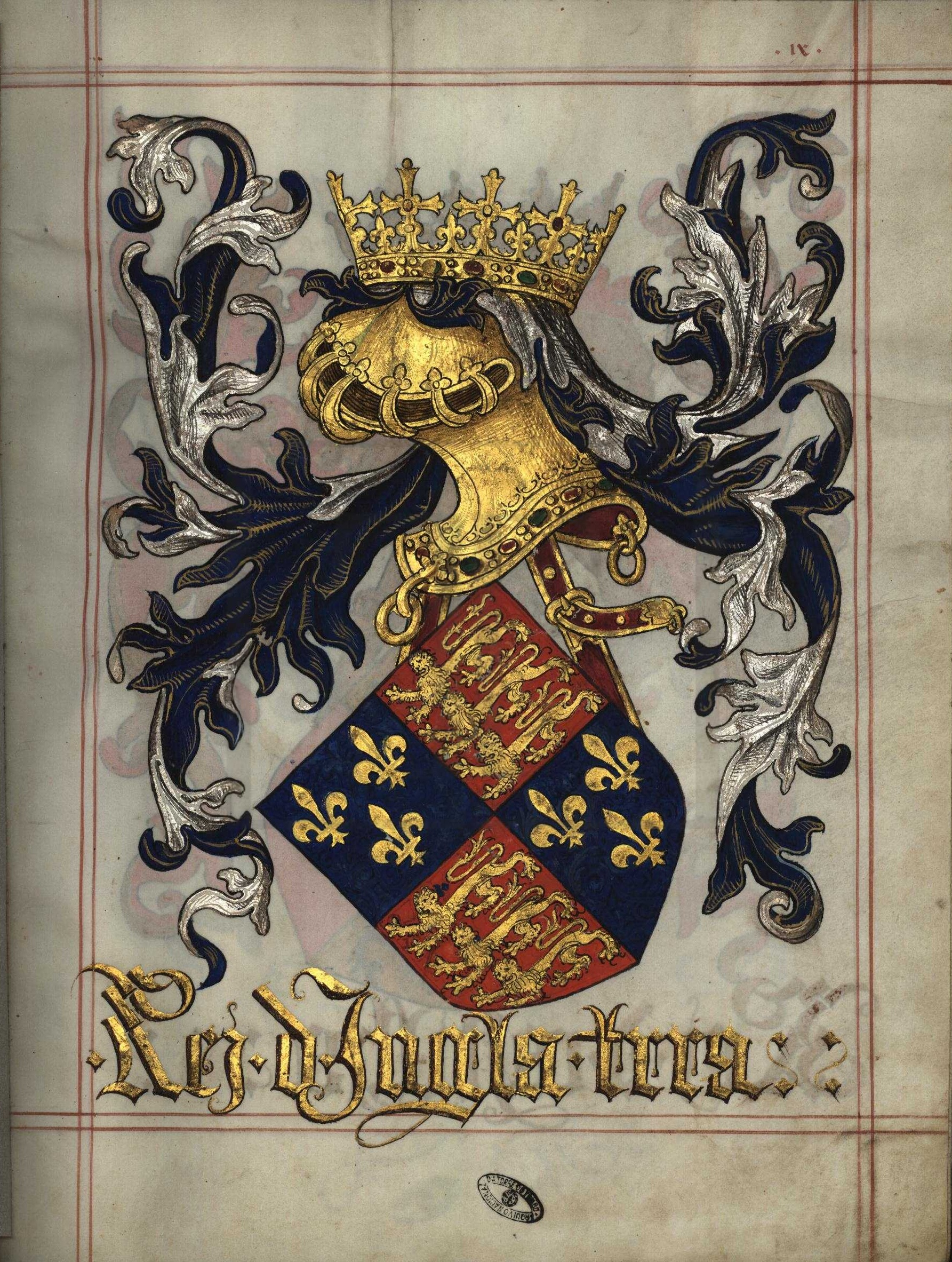 Livro do Armeiro-Mor, Armas do Rei de Inglaterra (fl 9)